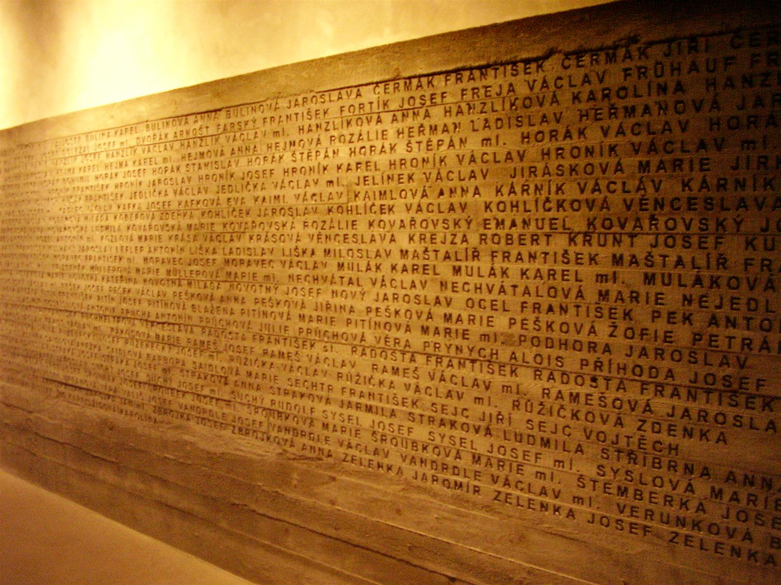 Zeď se jmény obětí vyhlazení Lidic v místním muzeu